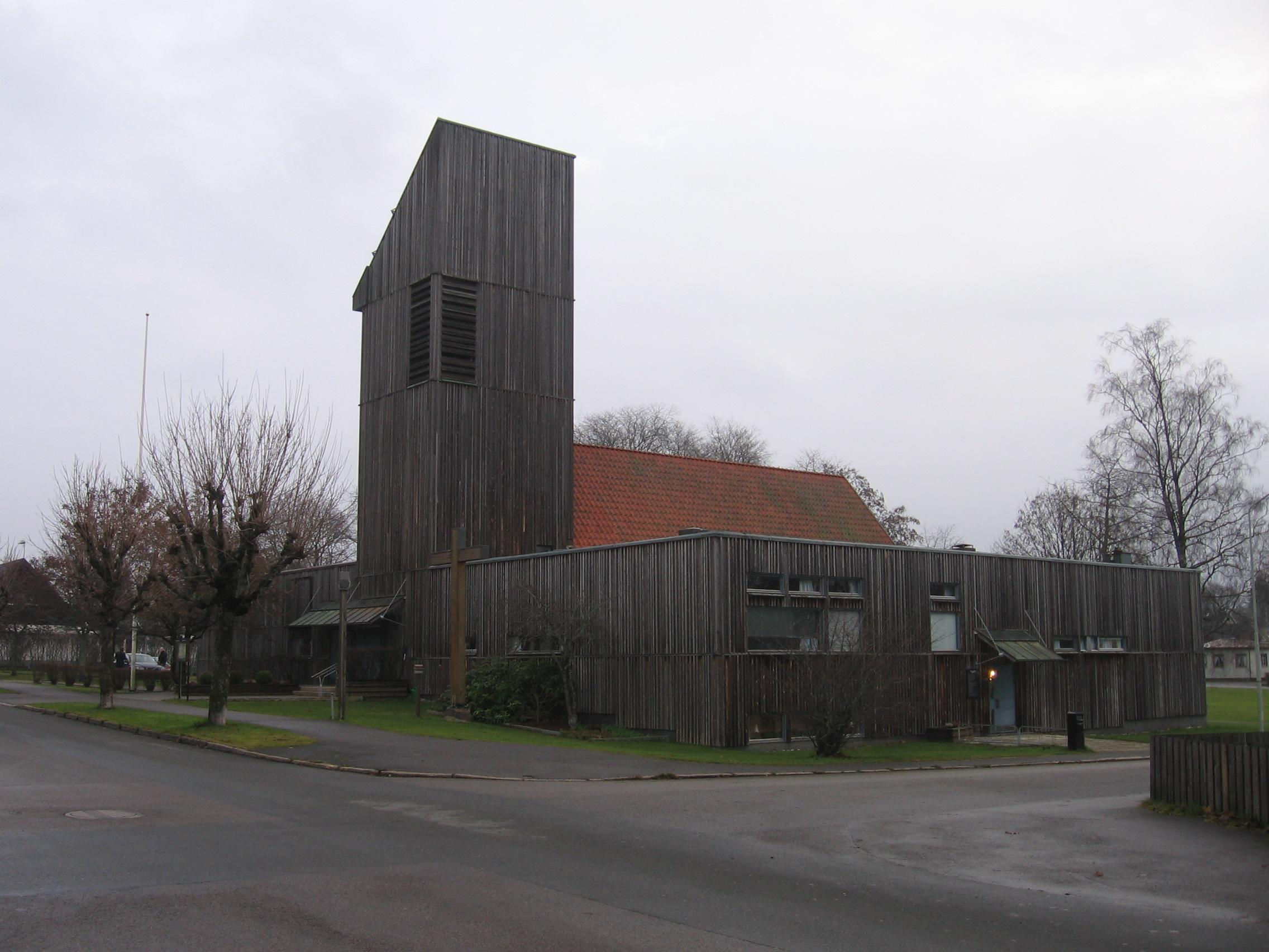 Bodafors kyrka uppfördes 1942 och byggdes om på 1970-talet, då man anlitade arkitekt Ralph Erskine som lät bygga in den gamla kyrkan i en ny.